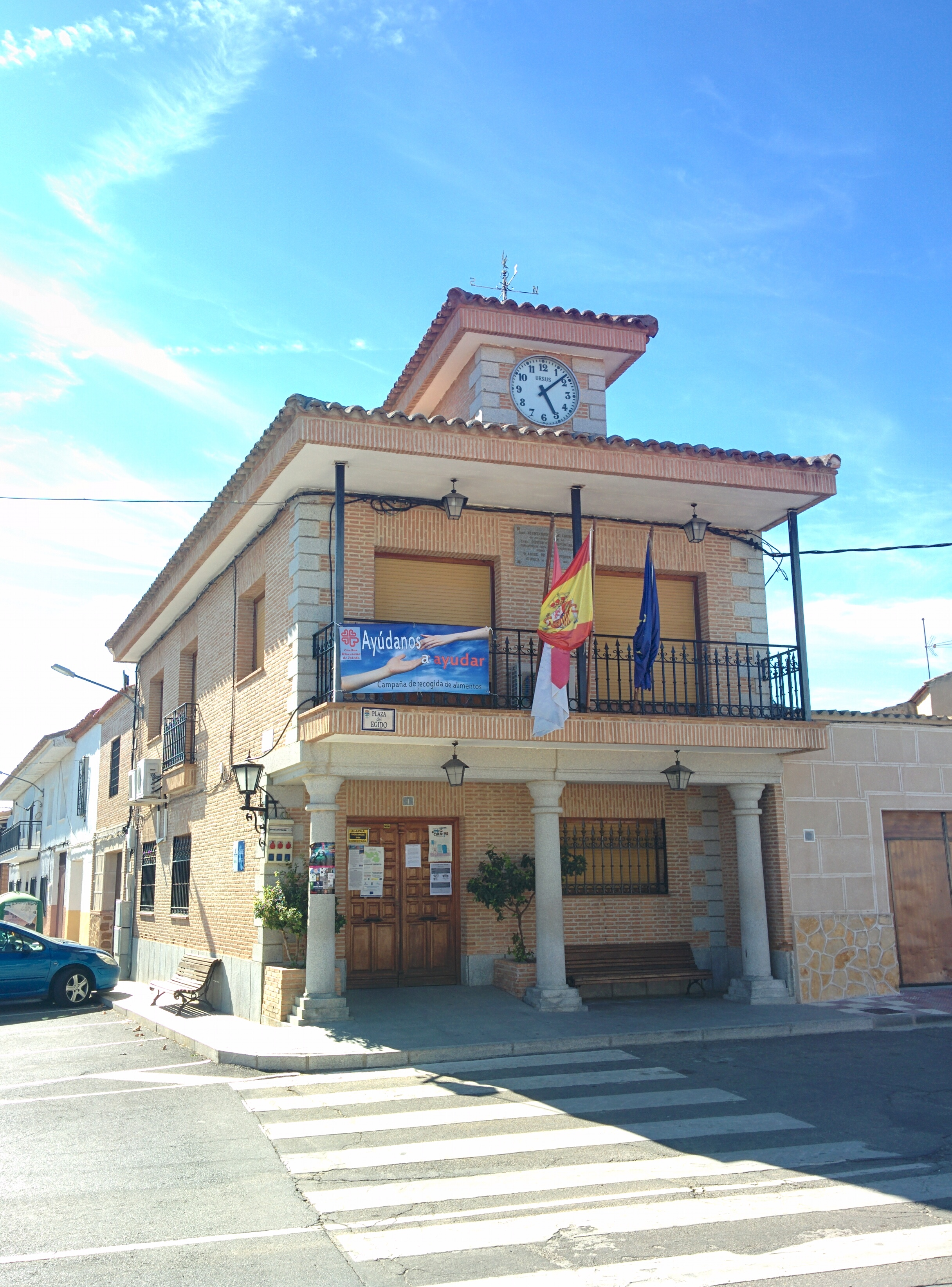 Casa consistorial de Chueca (Toledo, España).